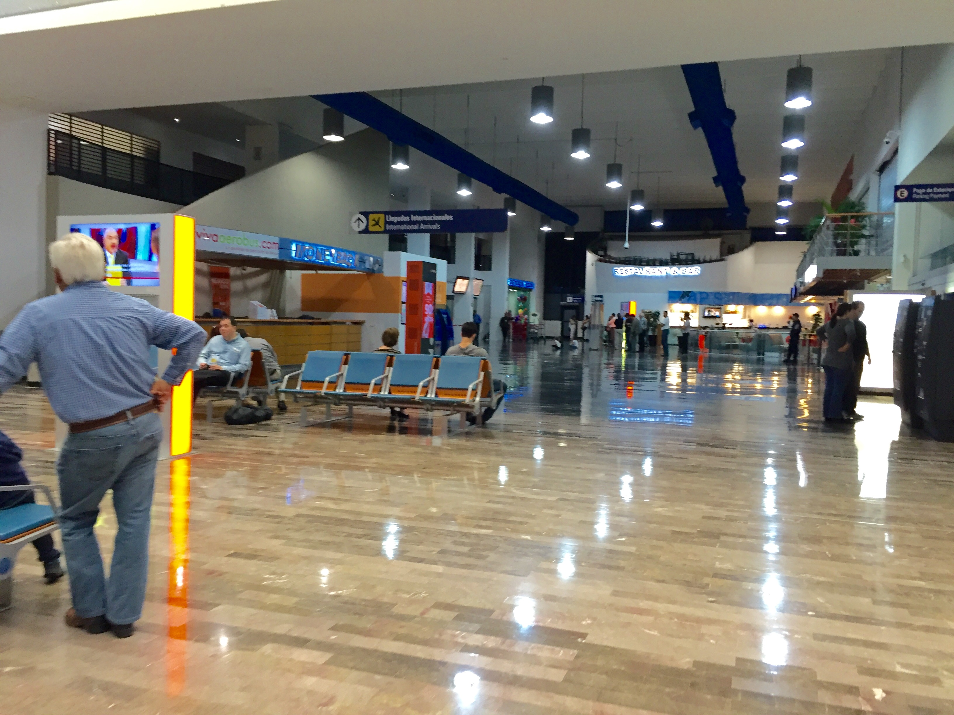 Pasillo del Aeropuerto Internacional de Monterrey.